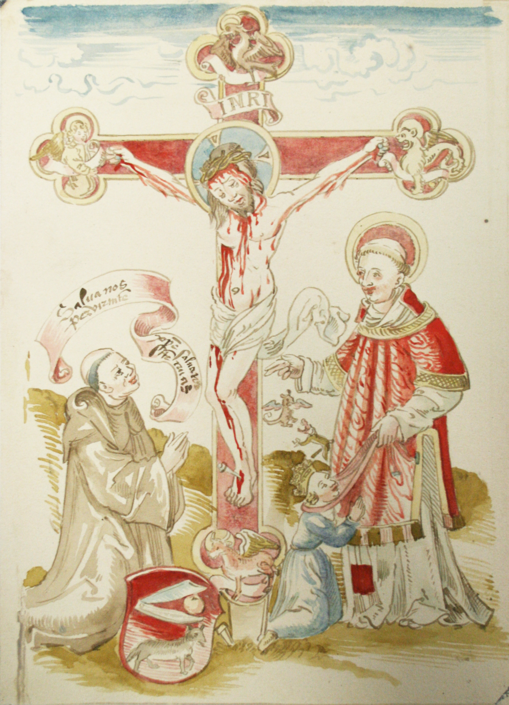 Illustration aus dem Salbuch des Klosters Naumburg: Der Propst (links) und die Schutzheiligen des Klosters (Hl. Cyriacus und Hl. Kreuz)